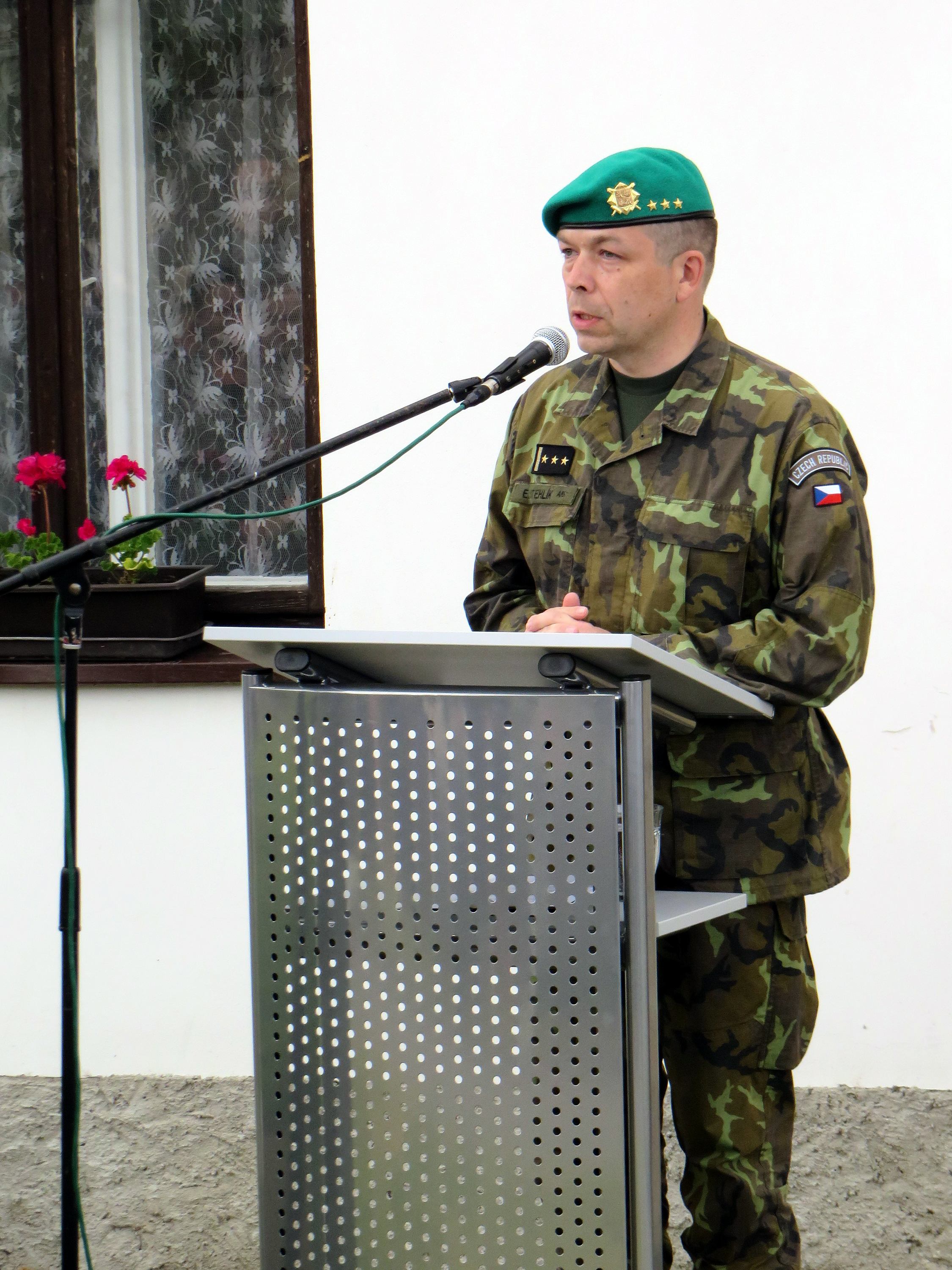 Senice. Pietní akt k uctení památky skupiny Silver A. Plk. Eduard Stehlík.